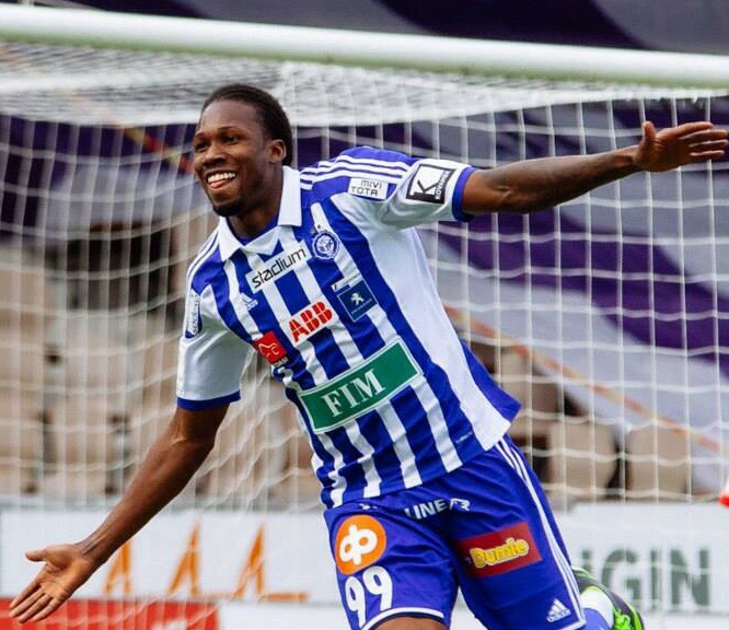 Mac Kandji 2014